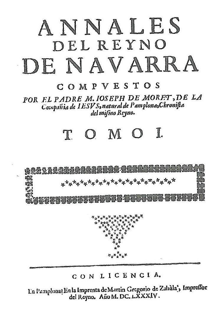 Anales del Reino de Navarra, T. I. José de Moret. Pamplona, Martín Gregorio de Zabala, impresor, 1684